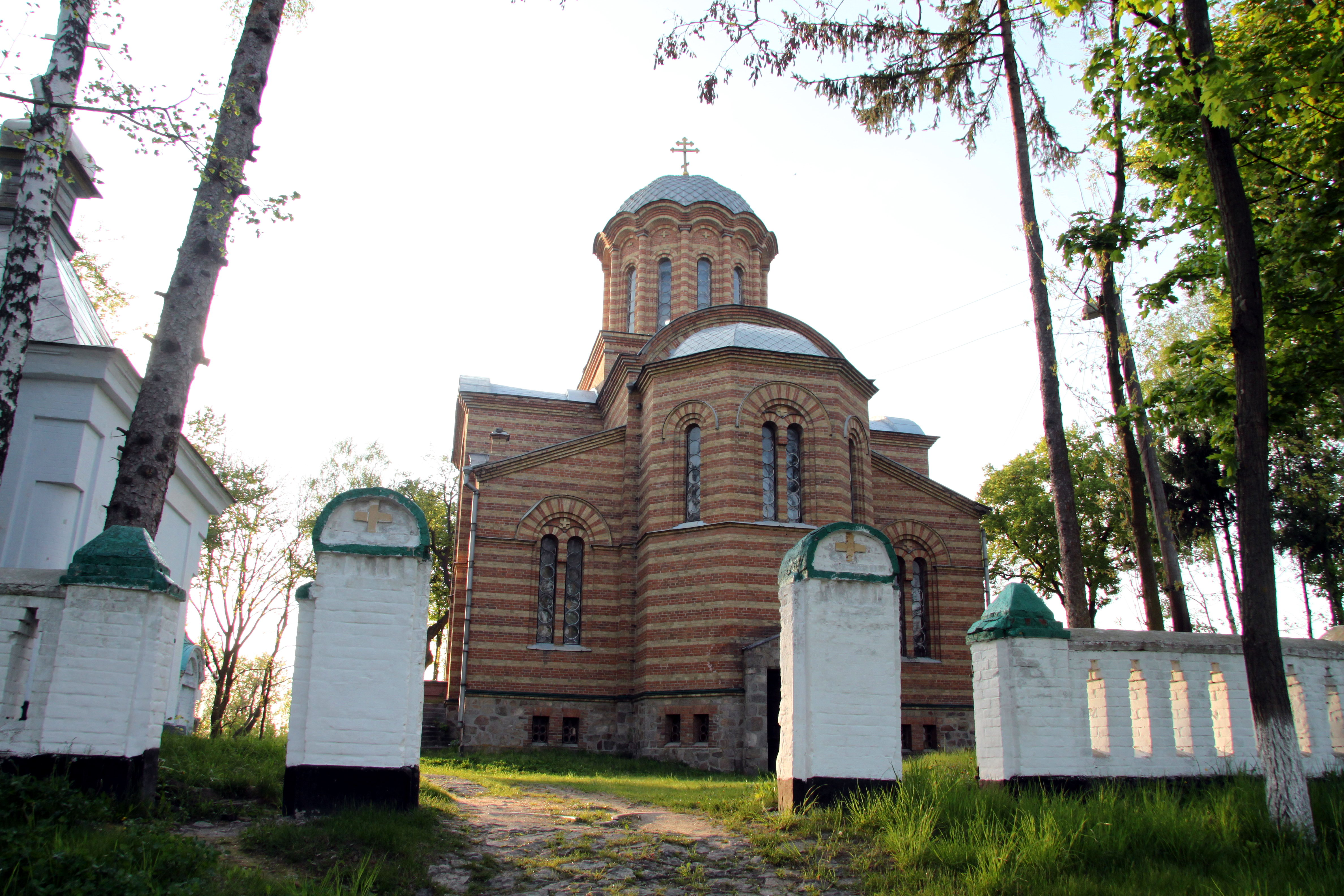 Церква-мавзолей графа Ігнатьєва (мур.), вул. Нижня Гута, Круподеринці